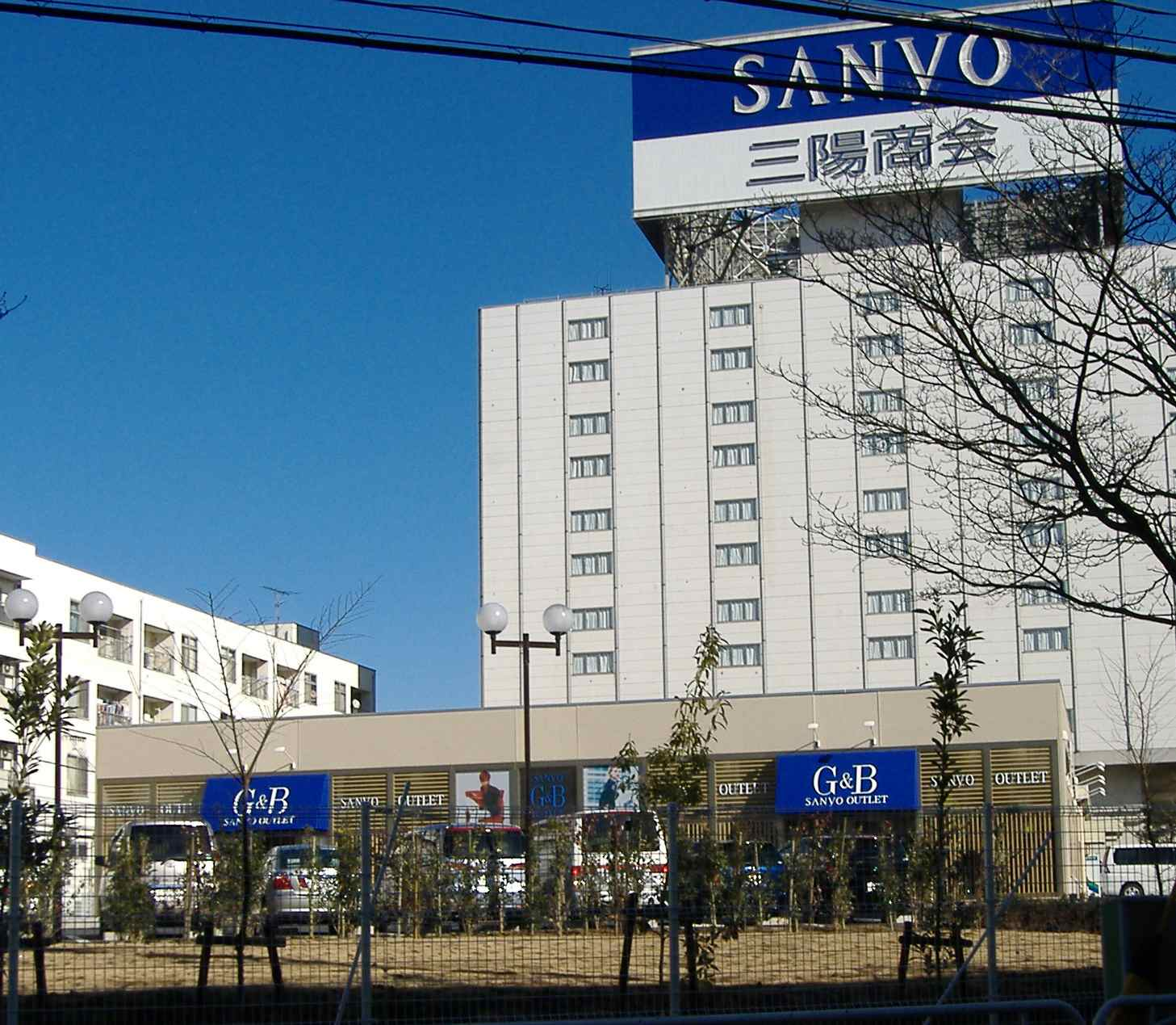 株式会社三陽商会本社。